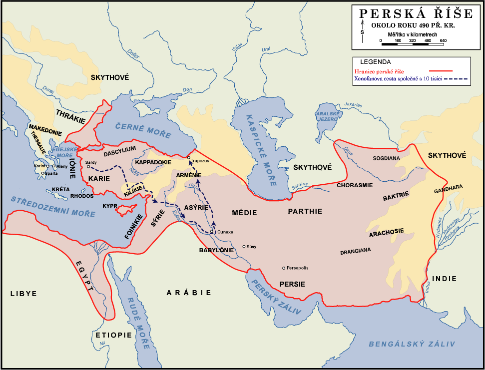 Rozsah perské říše kolem roku 490 př. Kr.